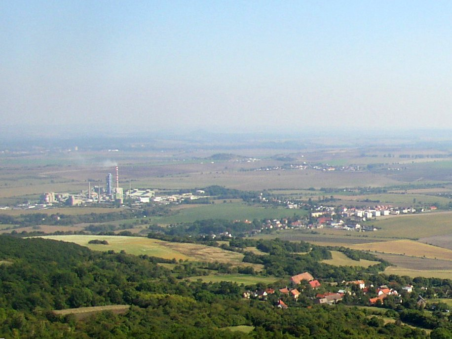 Čížkovice - celkový pohled od západu z vrchu Košťálova (481 m) Vlevo cementárna Čížkovice, vpravo Čížkovice, vpravo vpředu osada Košťálov, horní část Jenčic Vyfotografoval Miaow Miaow v září 2005, PD-self (bude-li obdobný pohled v lepší kvalitě, neváhejte a nahraďte jím teno obrázek)